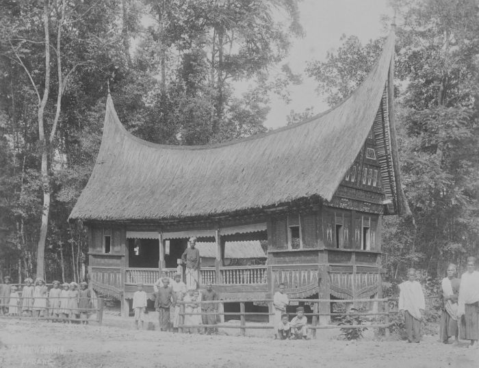 foto. Minangkabau raadhuis in Matoer